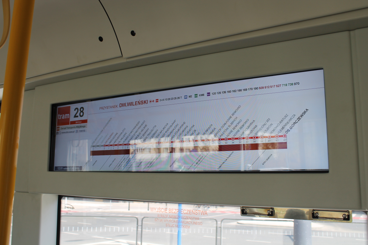 Monitor wyświetlający trasę w tramwaju Pesa Jazz 134N #3801.